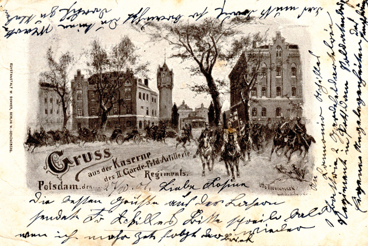 Potsdam, Rote Kaserne. Ansichtskarte nach einem Gemälde von Otto Thomasczek (1854-1923).